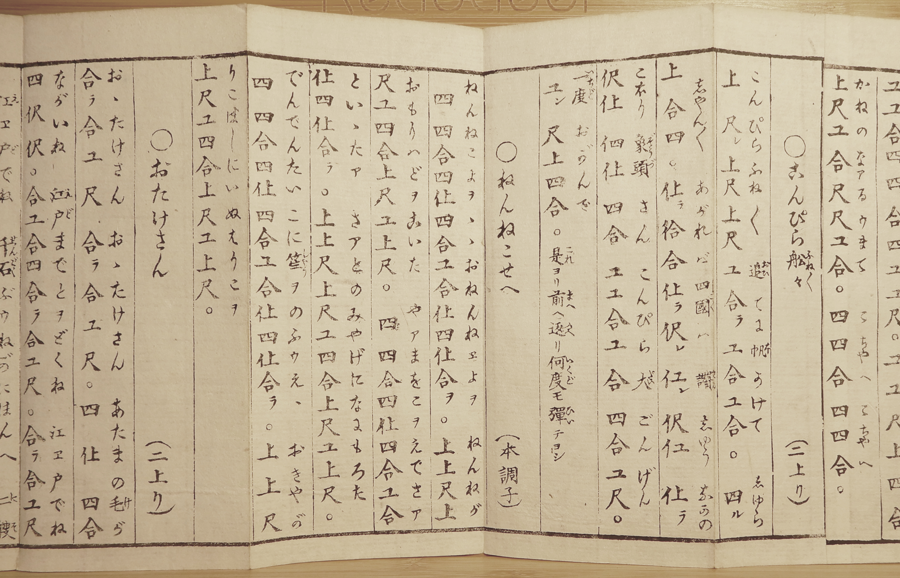 鈴木萬次郎『月琴雑曲独稽古』1897年刊(折り本)に載せる「金比羅船々」と「ねんねんころりよ」工尺譜と歌詞。